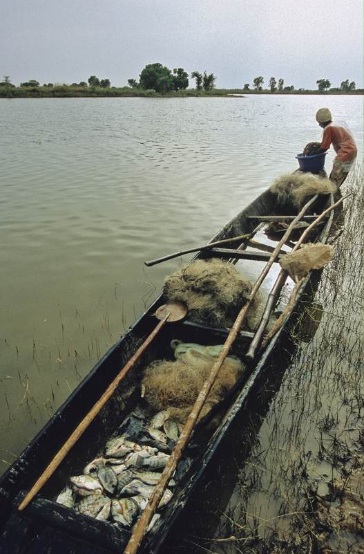 Kalabougou, Mali.